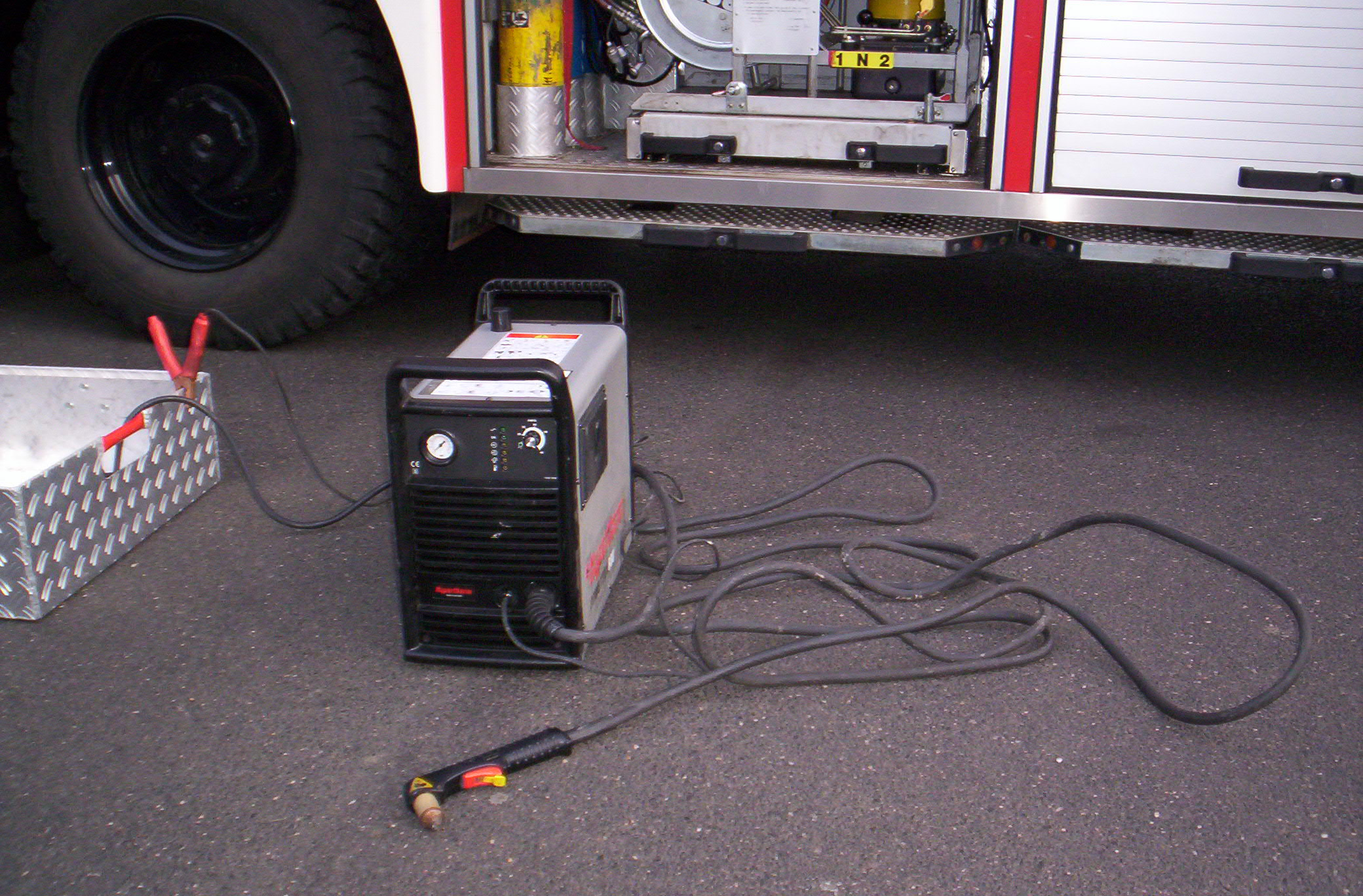 Plasmaschneider